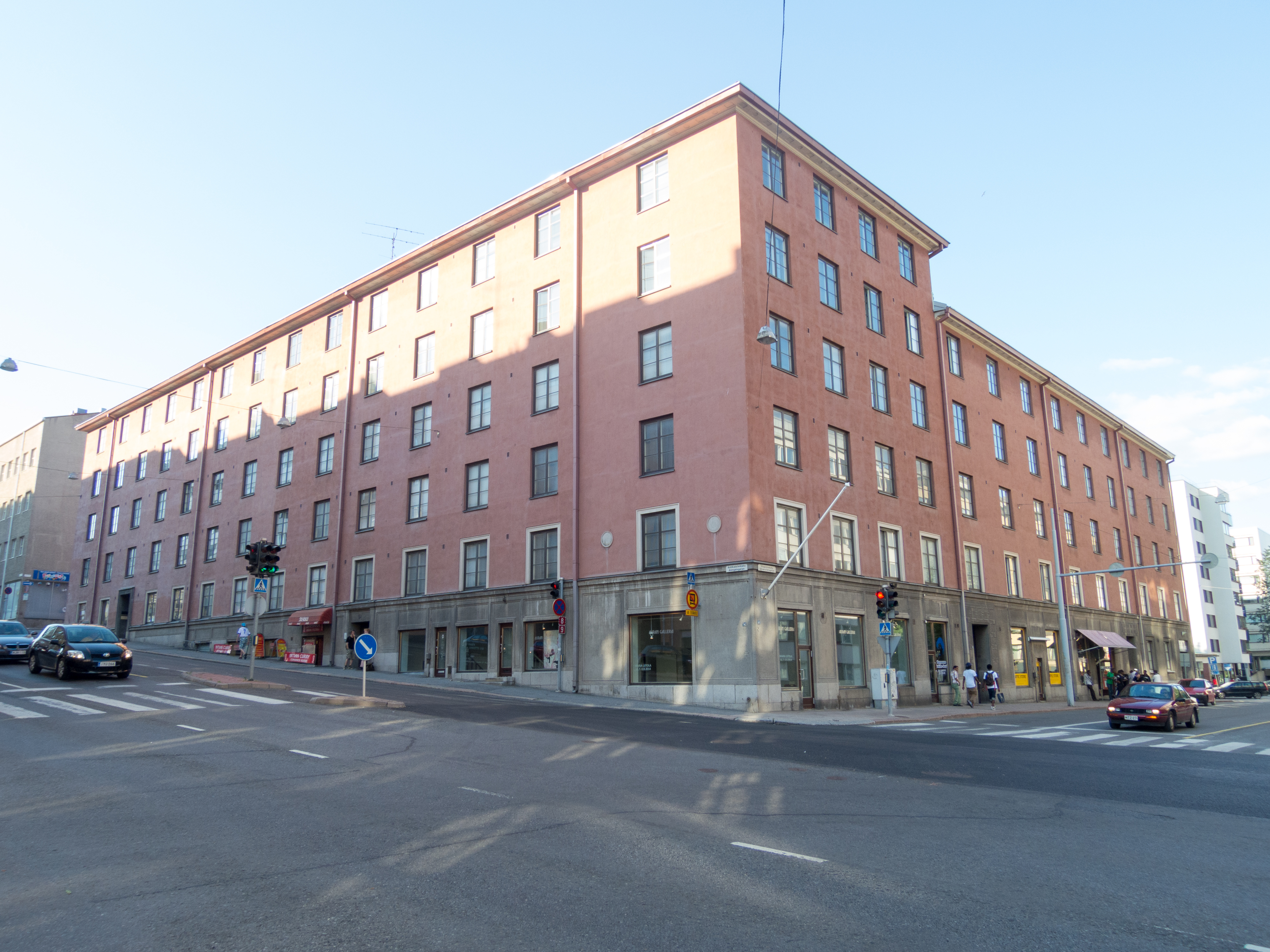 Aninkaistenkatu 5 Turku